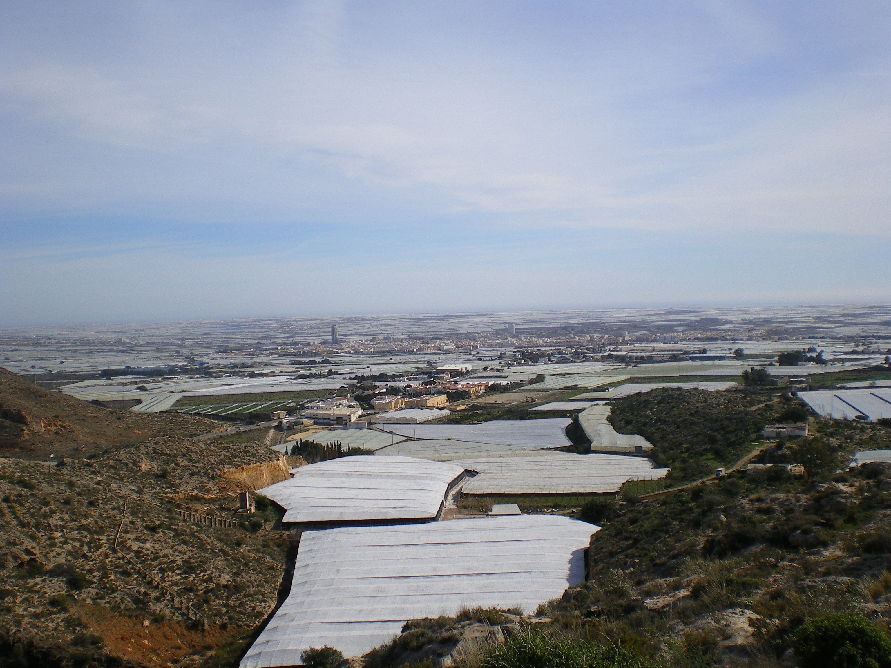 Fotografía del mar de plástico en El Ejido, Almería, España, con el edificio Torre Laguna al fondo, tomada hacia el sur.